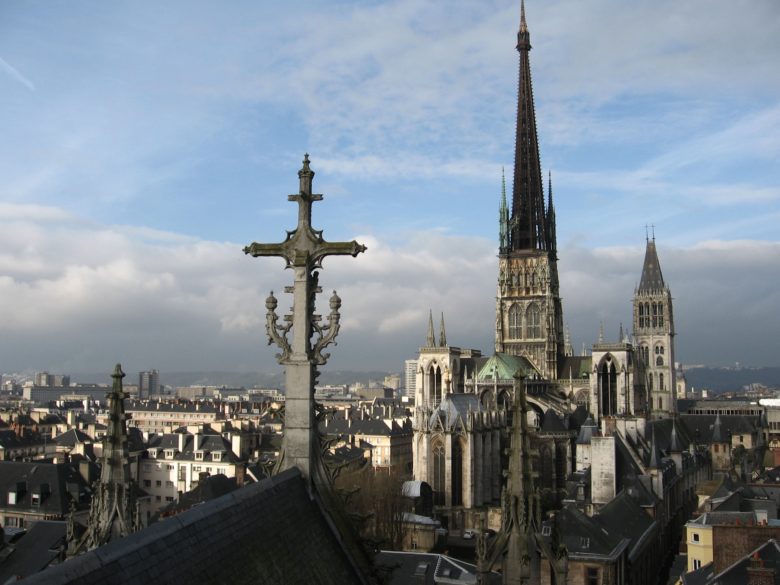 Rouen Cathédrale Notre-dame vue de l'église Saint maclou .